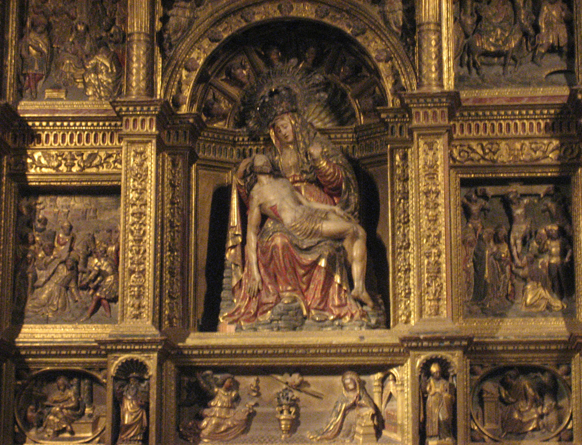 Detalle del retablo de La Piedad realizaado por Jeroni Xanxo en 1548 para la Catedral de Santa María de Urgel (Cataluña) (España)